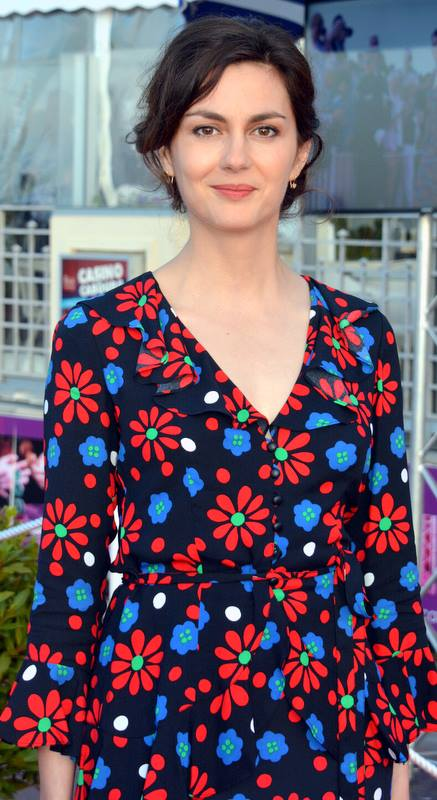 Julia Faure au festival de Cabourg